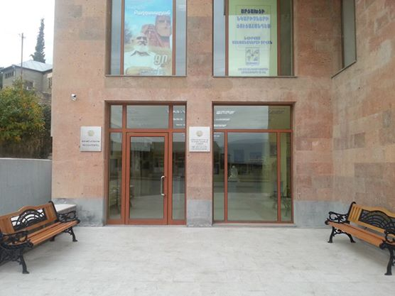 Ստեփանակերտի պատկերասրահ 6/231